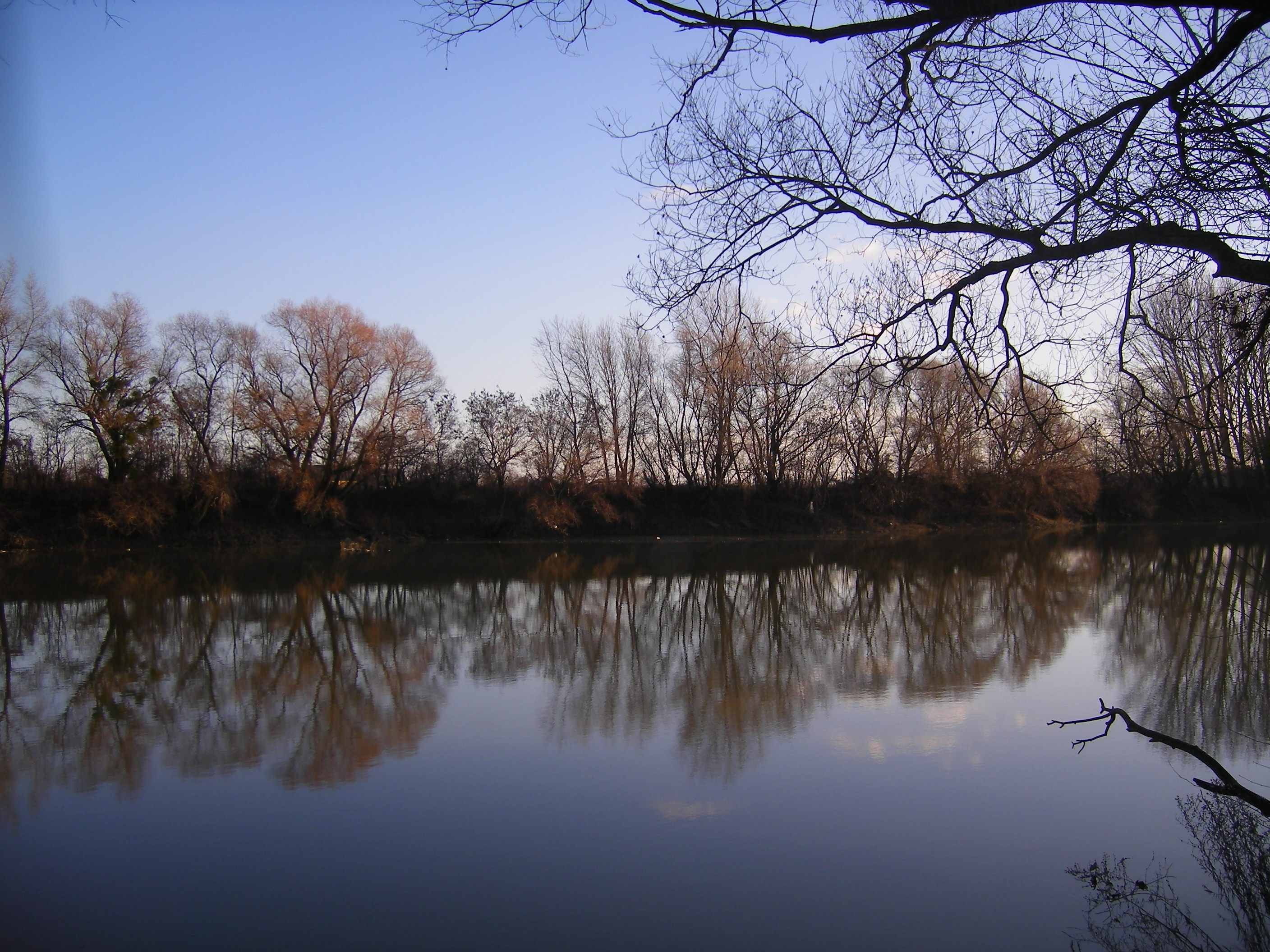 Ifjúságfalva - a Vág-parton